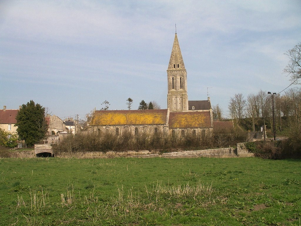 Eglise de Colombiers-sur-Seulles (Calvados)